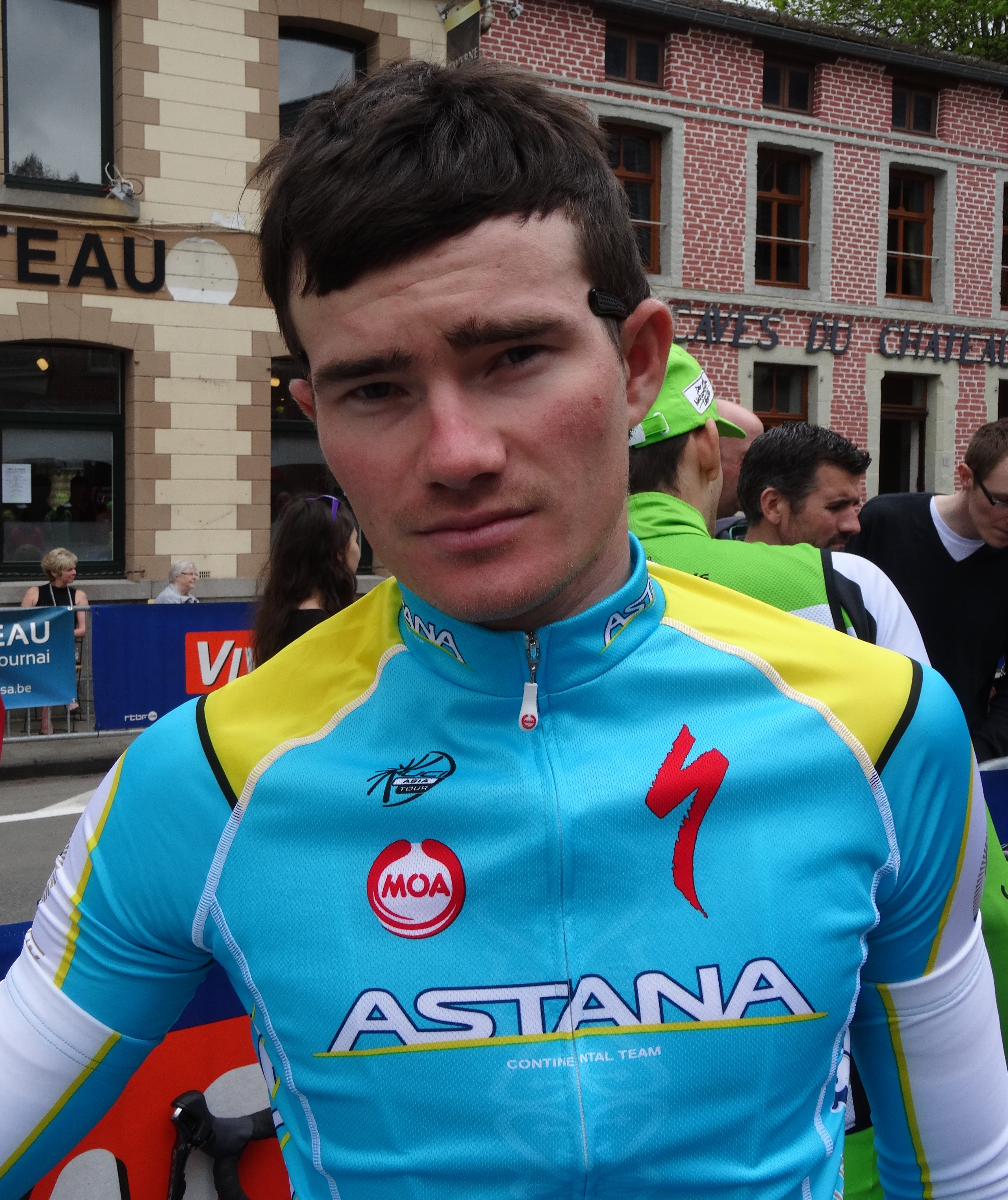 Triptyque des Monts et Châteaux 2014, étape 3, 6 avril 2014, départ de Belœil. Depicted person: Vadim Galeyev Depicted team: Astana Continental The creation of these files was made possible thanks to the organizers of the Triptyque des Monts et Châteaux 2014 English | français | +/−